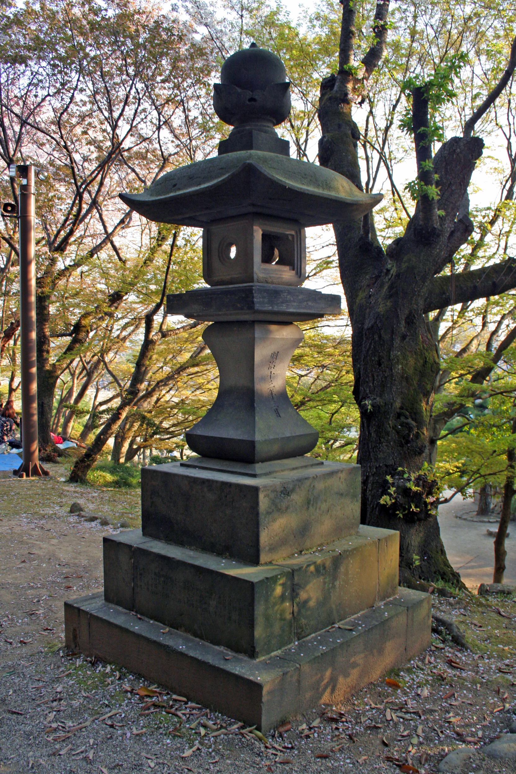 兵庫県姫路市にある姫路城。 25の石灯籠の裏側。